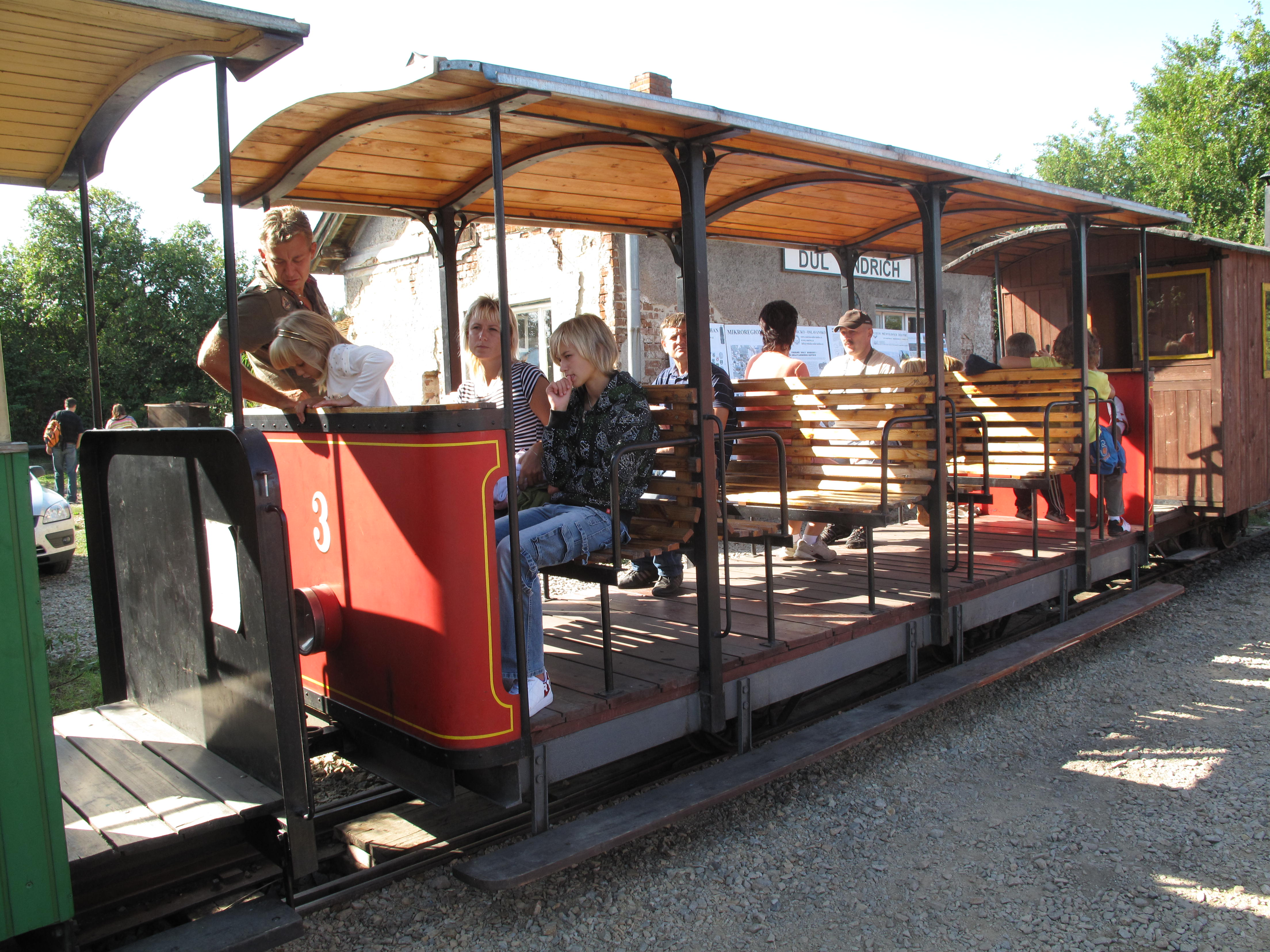 Muzeum průmyslových železnic